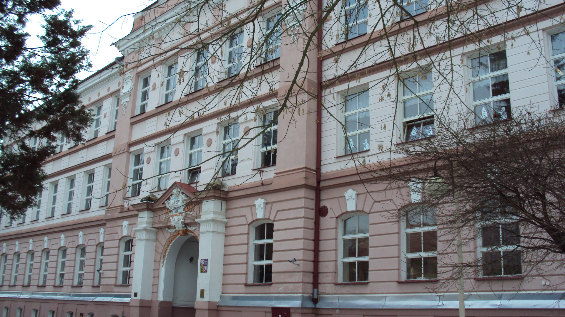 Základní škola Pátova v České Lípě